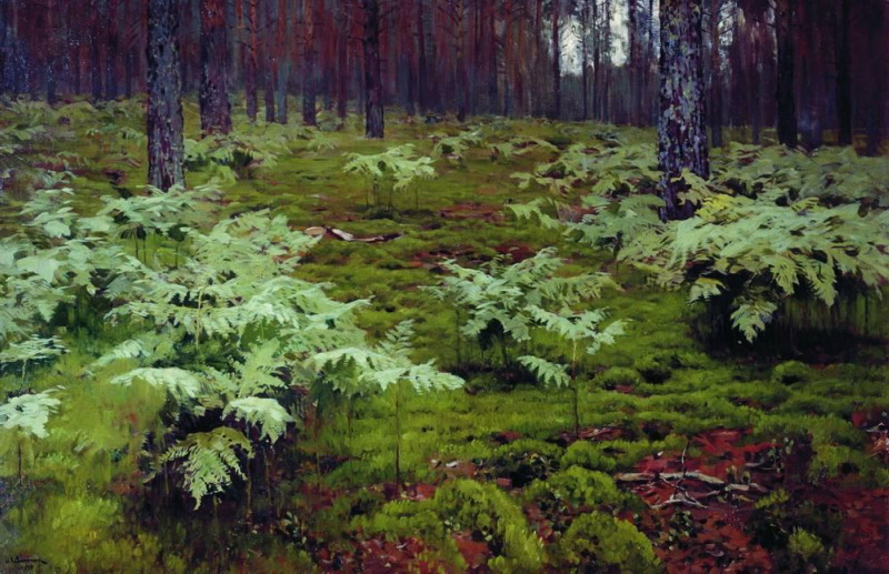 Папоротники в бору